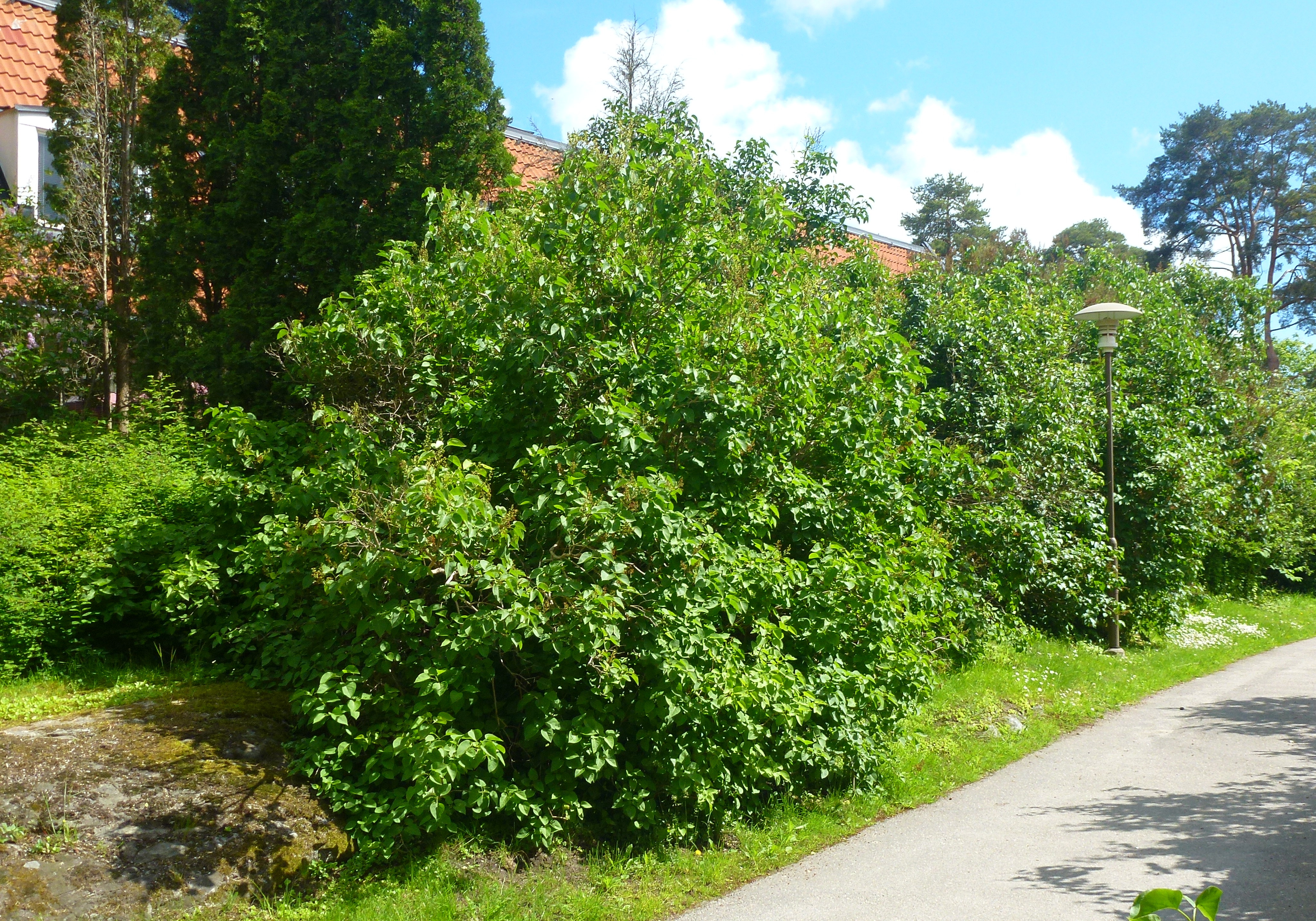 Syrenberså från torpet Bergholm utanför Skönstaholmsvägen 34.